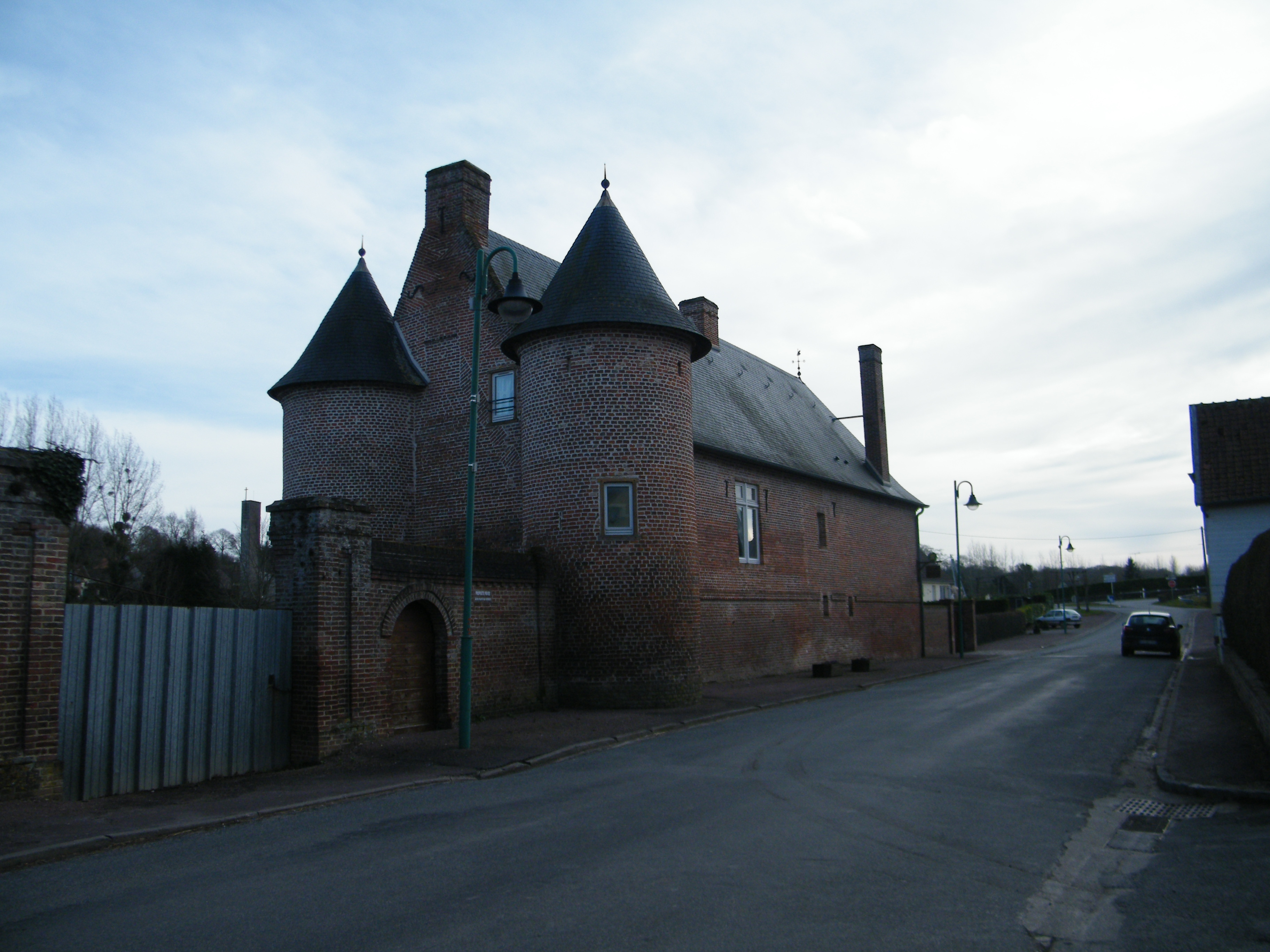 Le château de Miannay, lieu d'accueil.